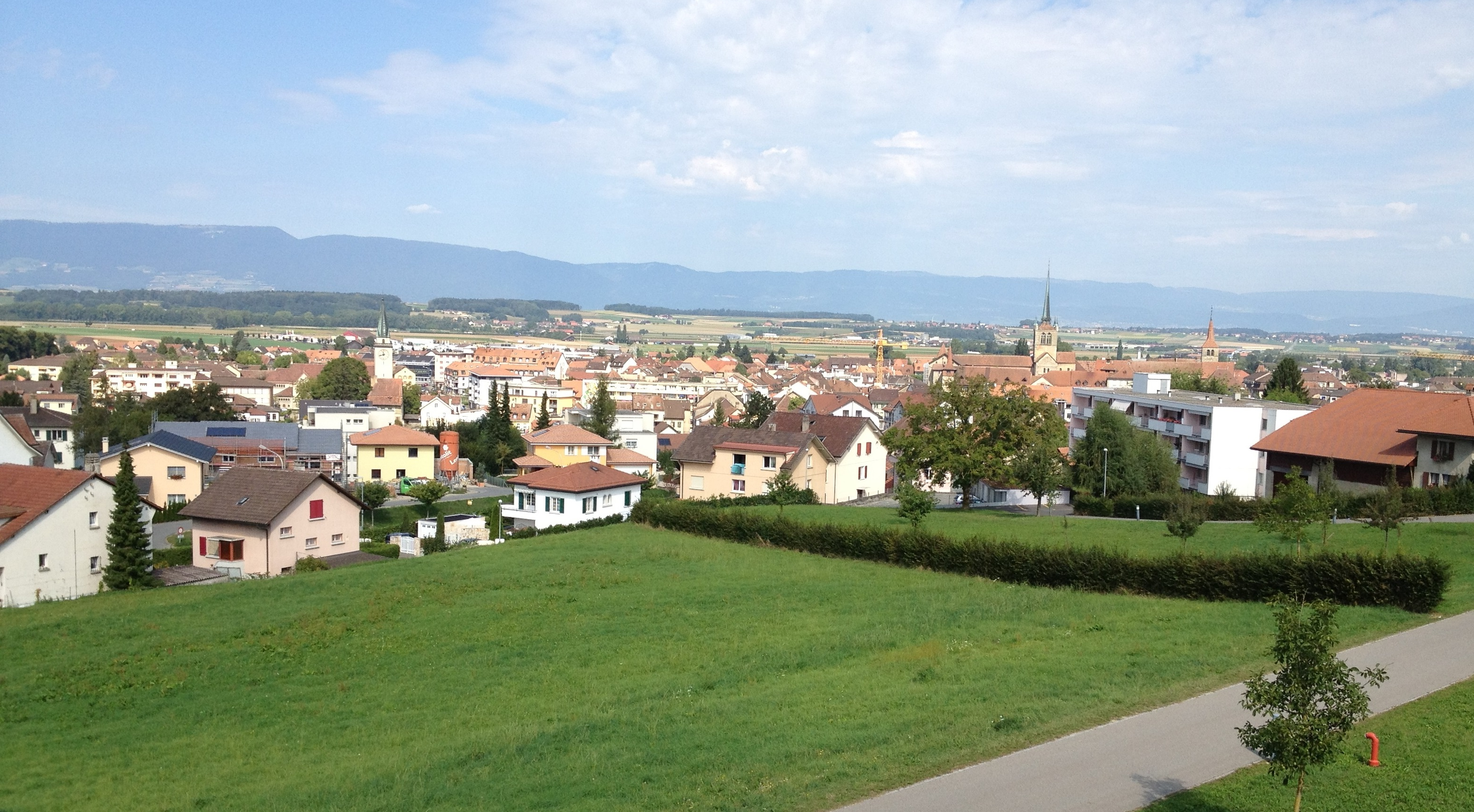 Vue de la ville de Payerne, en Suisse, depuis le gymnase intercantonal de la Broye.